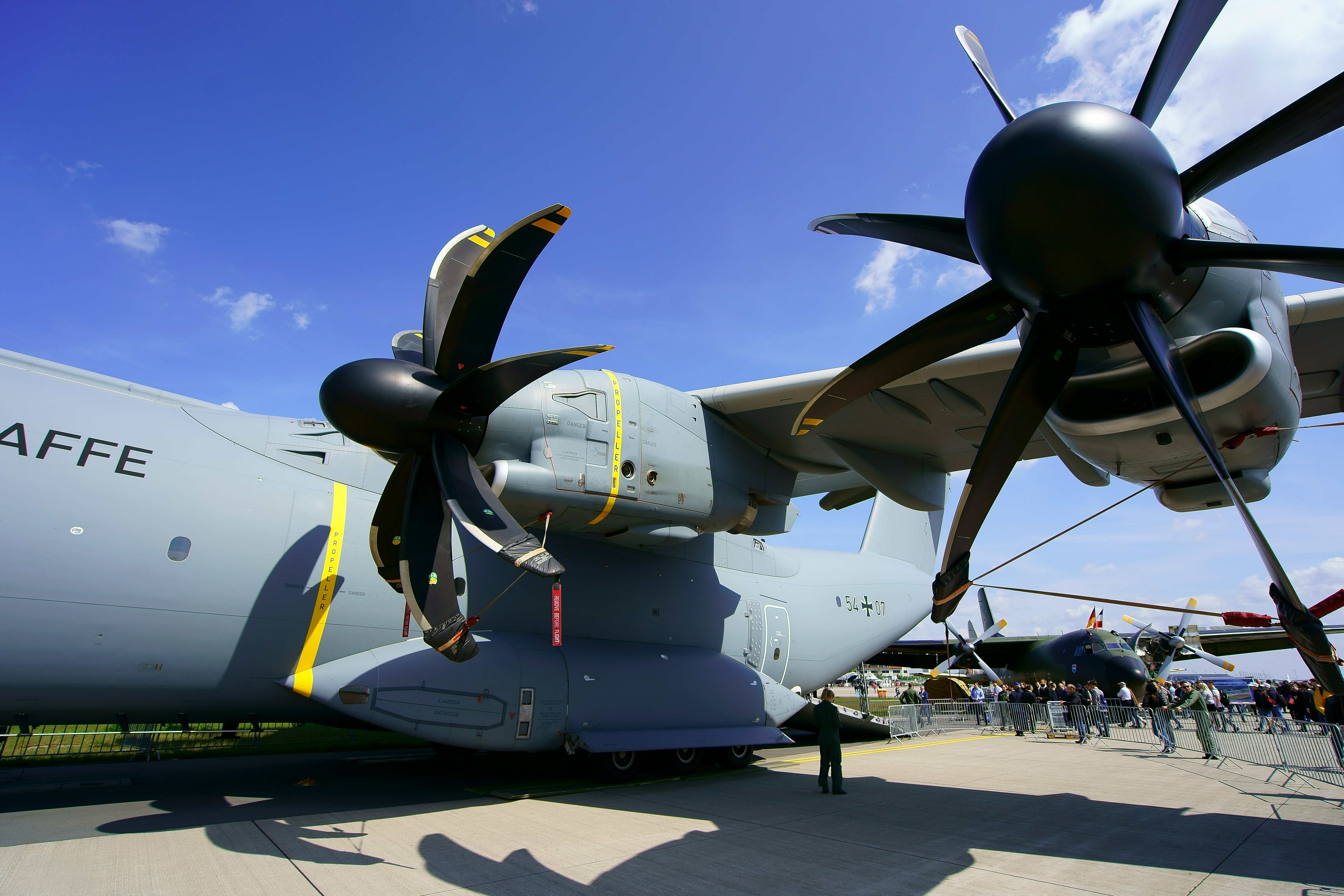 ILA 2018 - Der Airbus A400M Atlas ist ein militärisches Transportflugzeug von Airbus Defence and Space. Die A400M soll in den Luftwaffen von sieben europäischen NATO-Staaten den größtenteils veralteten Bestand an taktischen Transportflugzeugen der Typen Transall C-160 und Lockheed C-130 Hercules ersetzen.